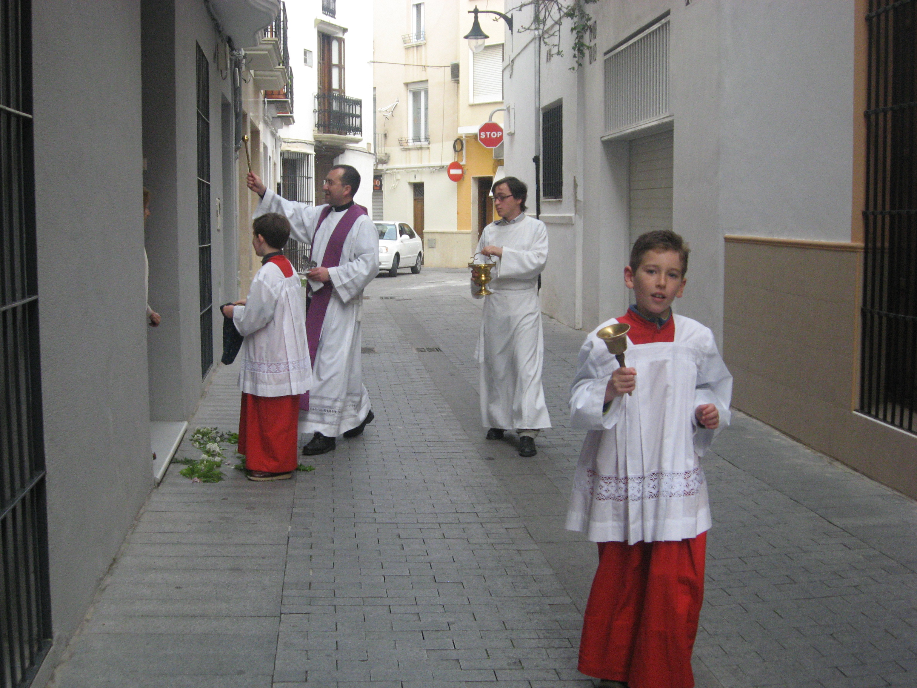 Celebración de la Salpassa, en Pego (Alicante-España). Fiesta tradicional durante la Semana Santa, perdida en la mayoria de pueblos de la Comunidad Valenciana.